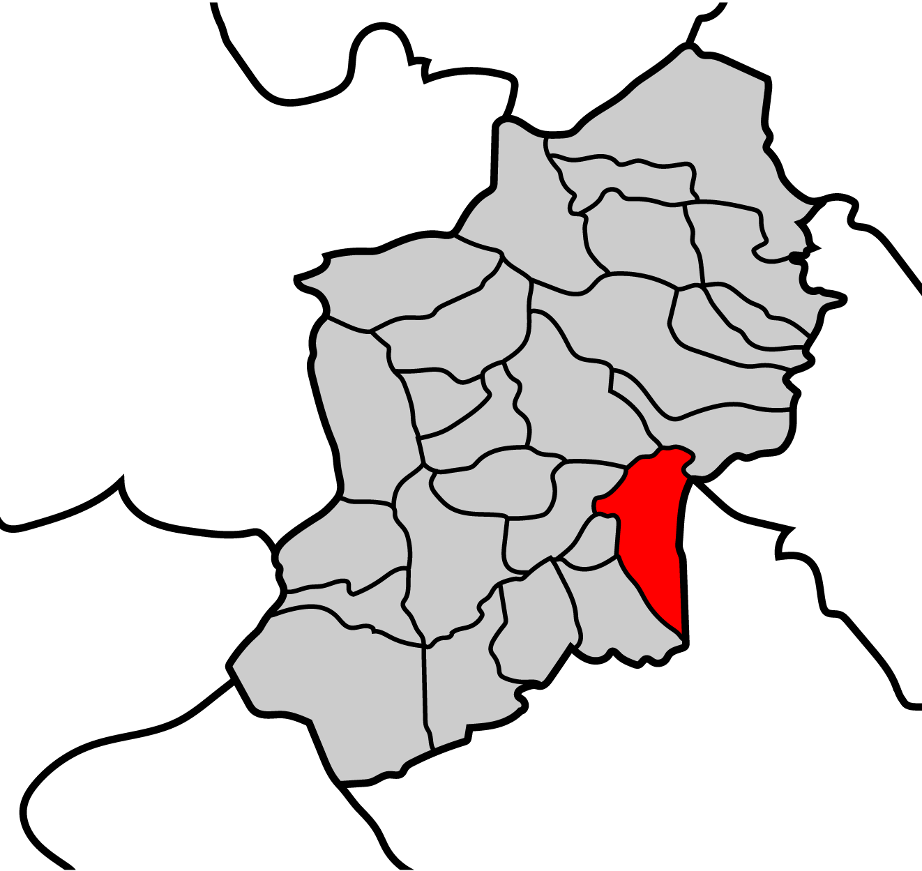 Mapa de la parroquia de Agueira ayuntamiento de Becerreá